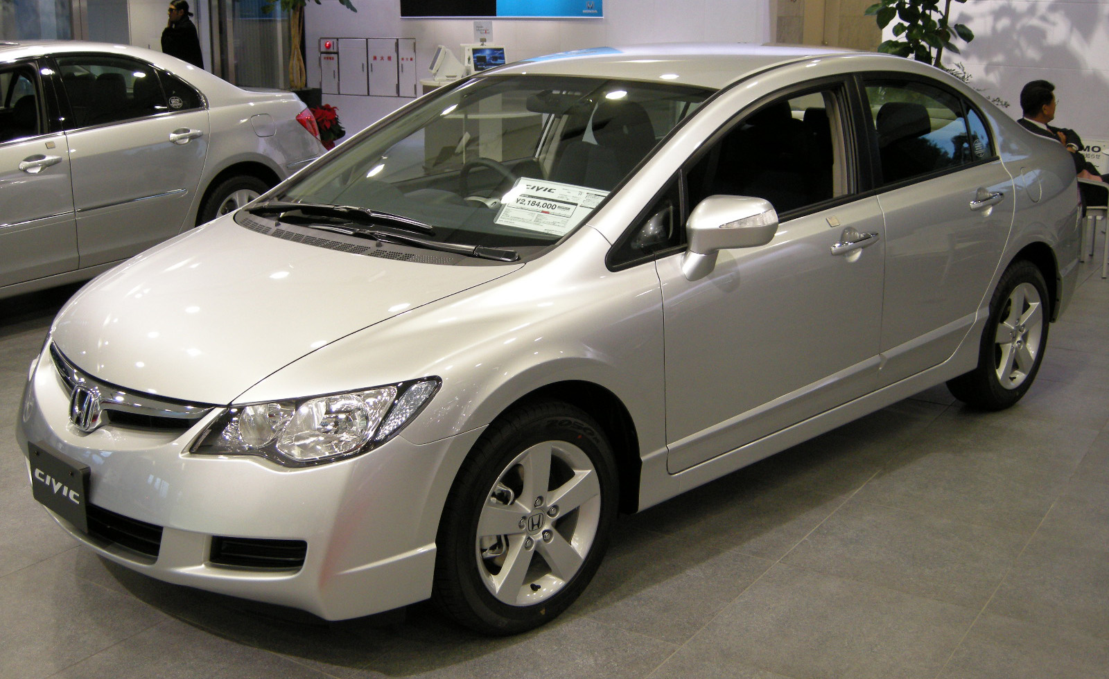 2007 Honda Civic 1.8GL in Honda Welcome Plaza